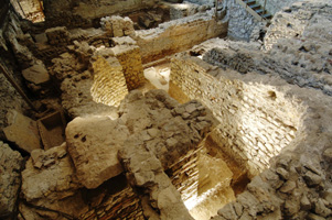 Musée archéologique de Grenoble